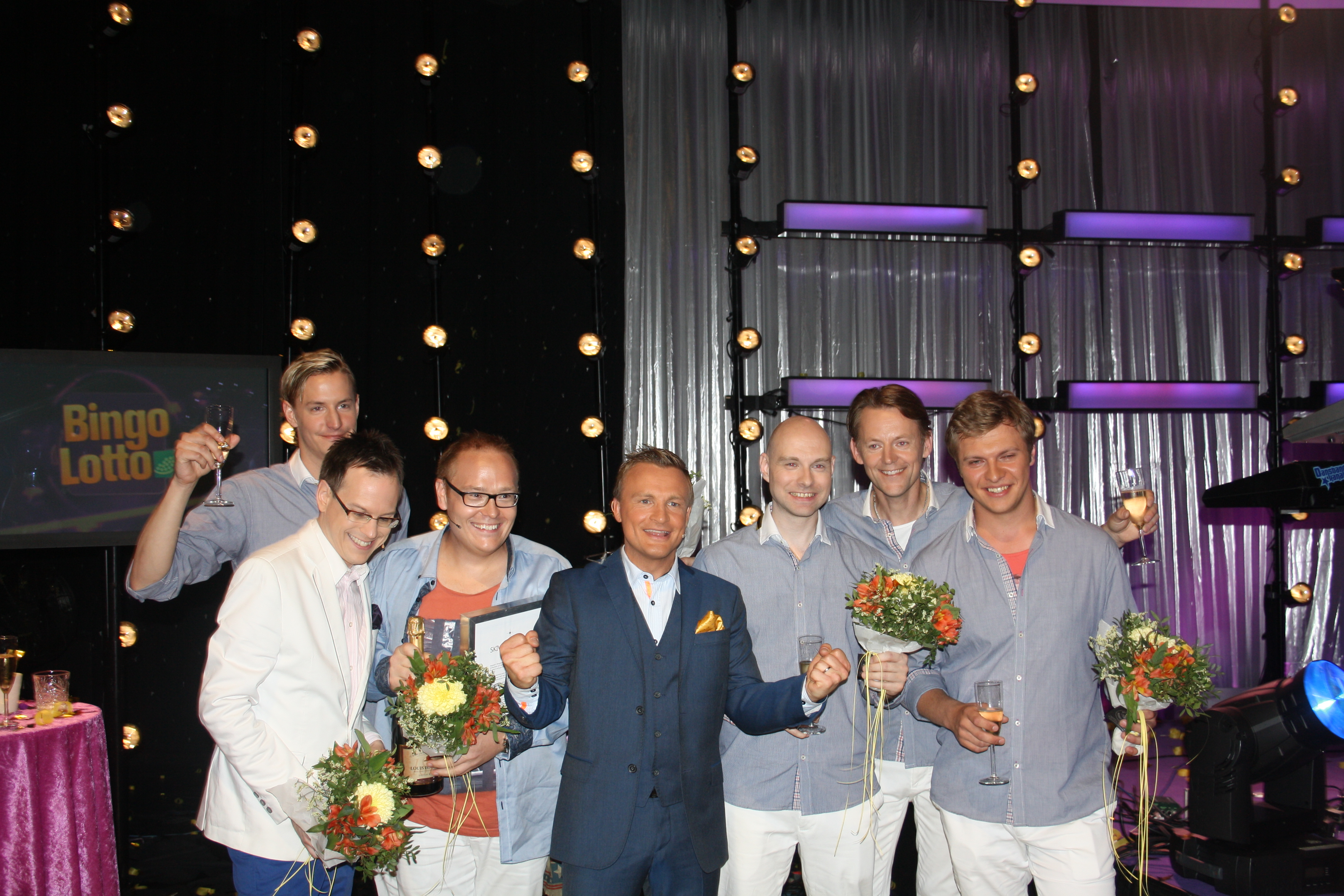 Framed och Jan Bylund i BingoLotto-studion efter segern i Dansbandstävlingen